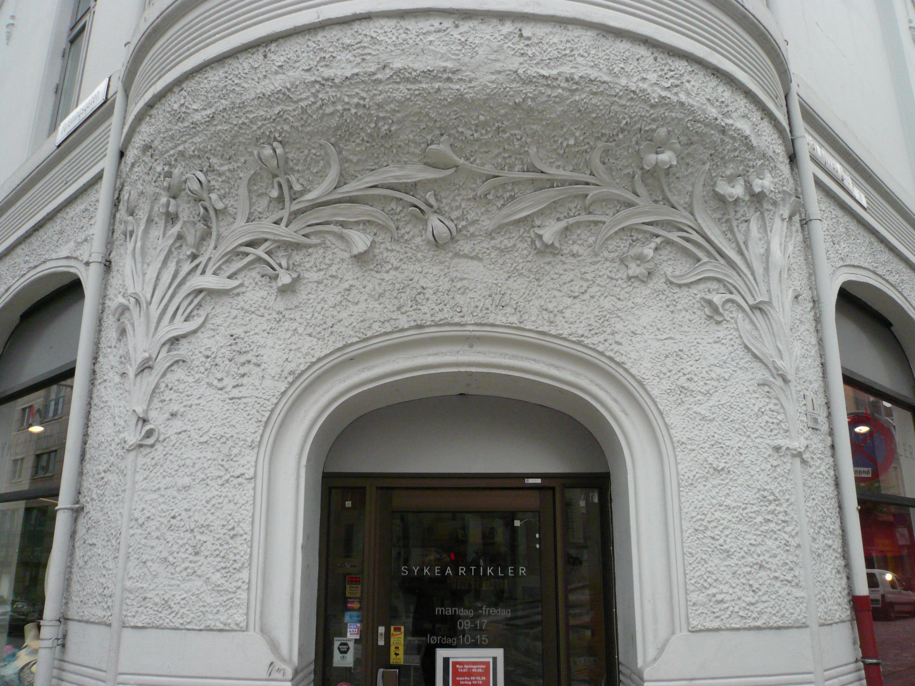 Liljeornamentikk over inngangsparti på Det hvite hus i Bergen